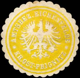 Sealing stamp Title: Amtsbezirk Eichenfelde - Kreis Ost - Prignitz Description: gelb, weiß, geprägt Place: Eichenfelde size: 3 cm